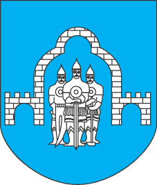 Затверджений 21 березня 2003 р. рiшенням сесії районної ради. На лазуровому полі срібна цегляна приаркова брама, до якої прилягають фрагменти фортечних зубчастих стін. У просвіті брами три ратники в обладунках. Посередині ратник з мечем, з боків — ратники з сохою і молотом. Автор — Ф. Колотюк. Назву Ратне виводять від слова рать — військова сила, озброєні загони. Ратники не тільки захищали кордони (ратник з мечем), а й займалися ремеслами (ратник з молотом) і обробляли землю (ратник з сохою). Брама з фрагментами зубчасних фортечних стін — укріплення, кордон, перехід (митний перехід, що є актуальним нині). Автор - Ф. Колотюк. Комп'ютерна графіка - В. М. Напиткін.